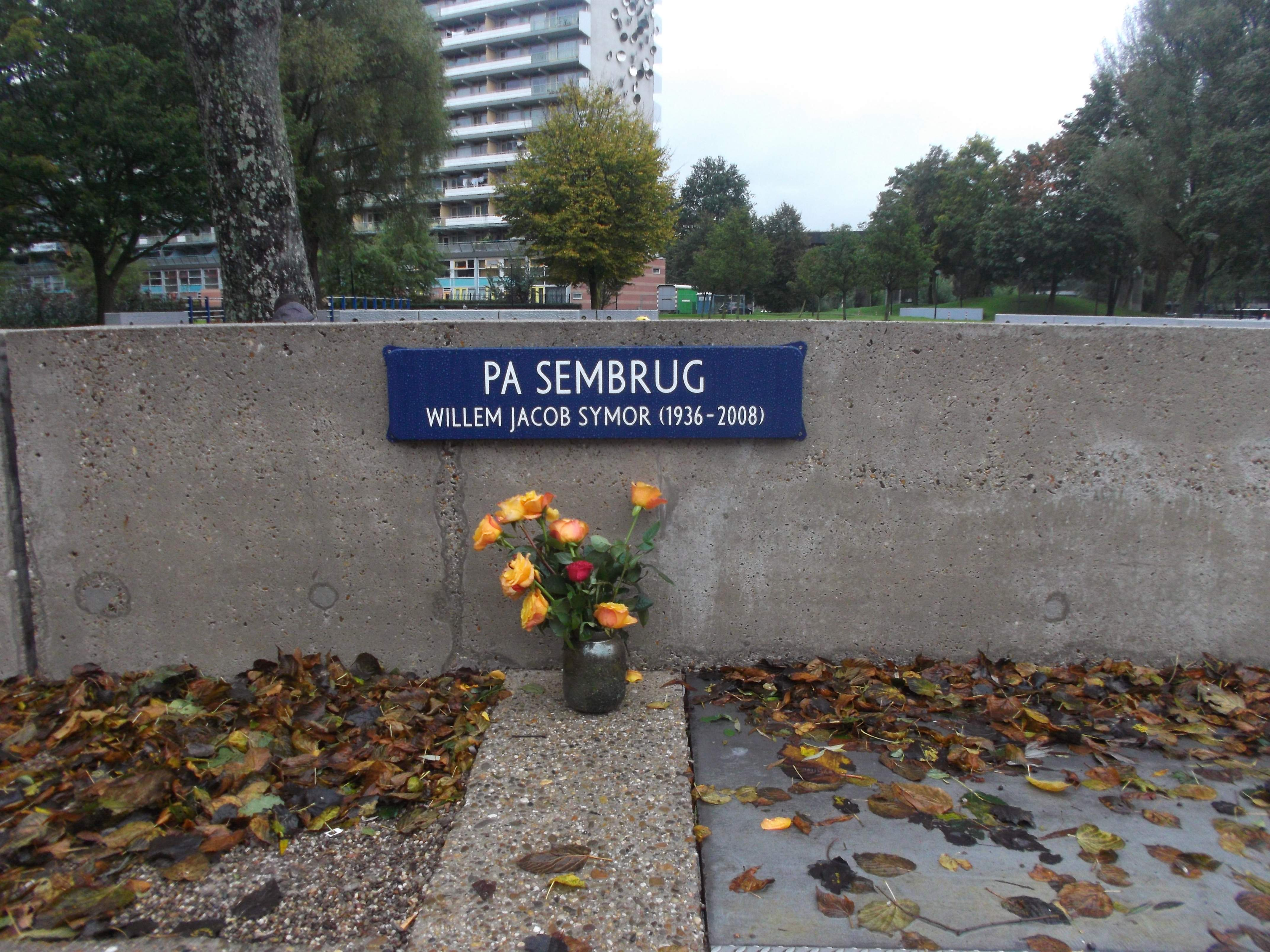 Willem Jacob Symor, "Pa Sem", redde een jongetje uit de brandende Bijlmerflats, vlak nadat een toestel van El Al op de flats stortte. Deze voetgangersbrug is naar hem vernoemd op 4 oktober 2017, 25 jaar na de ramp.